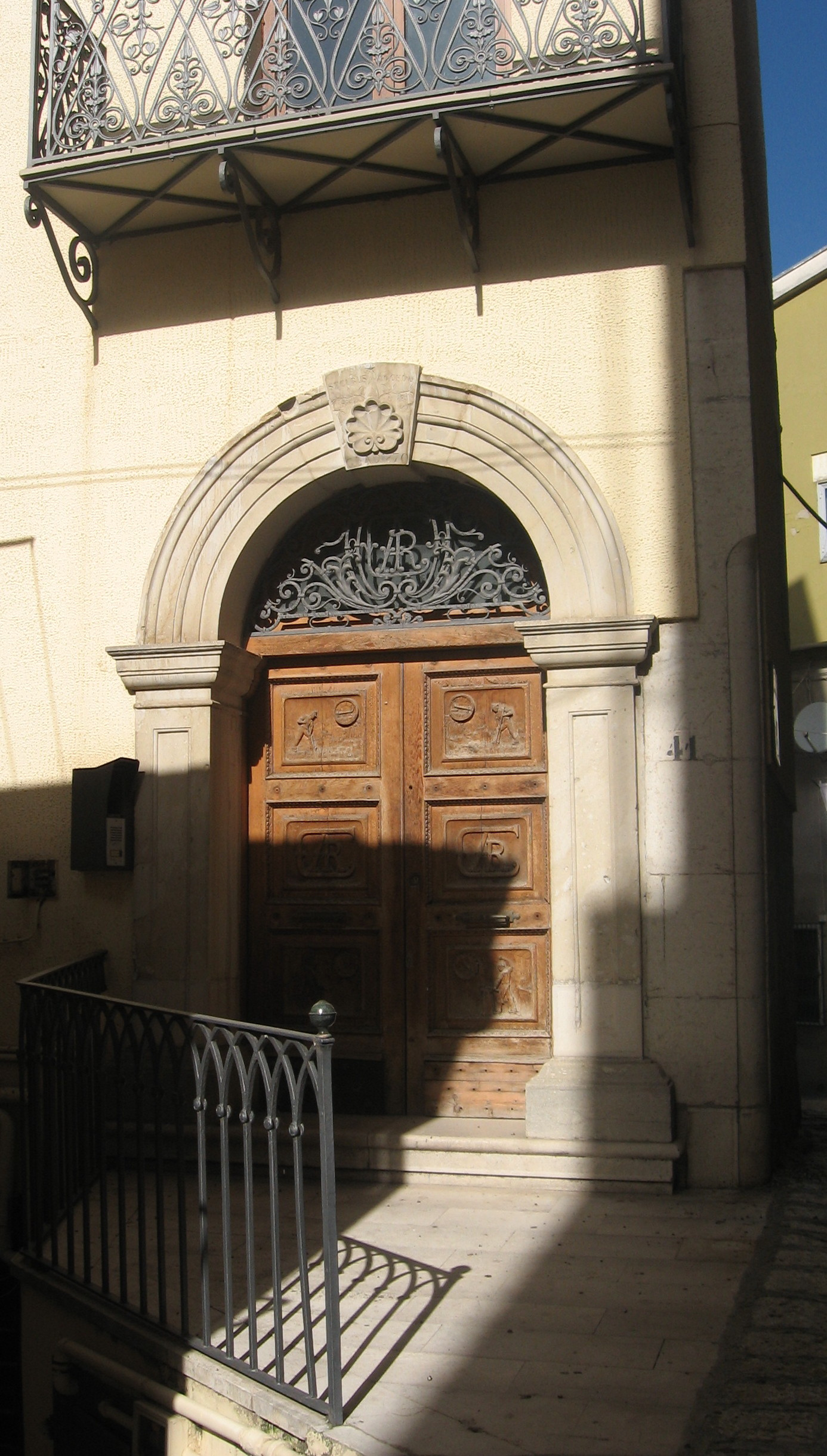 Portale palazzo Labella